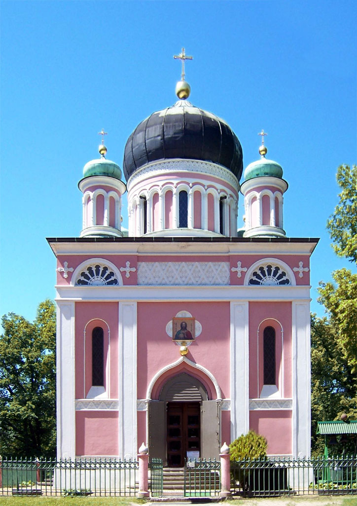 Die russisch orthodoxe Kirche Alexander Newski in Potsdam